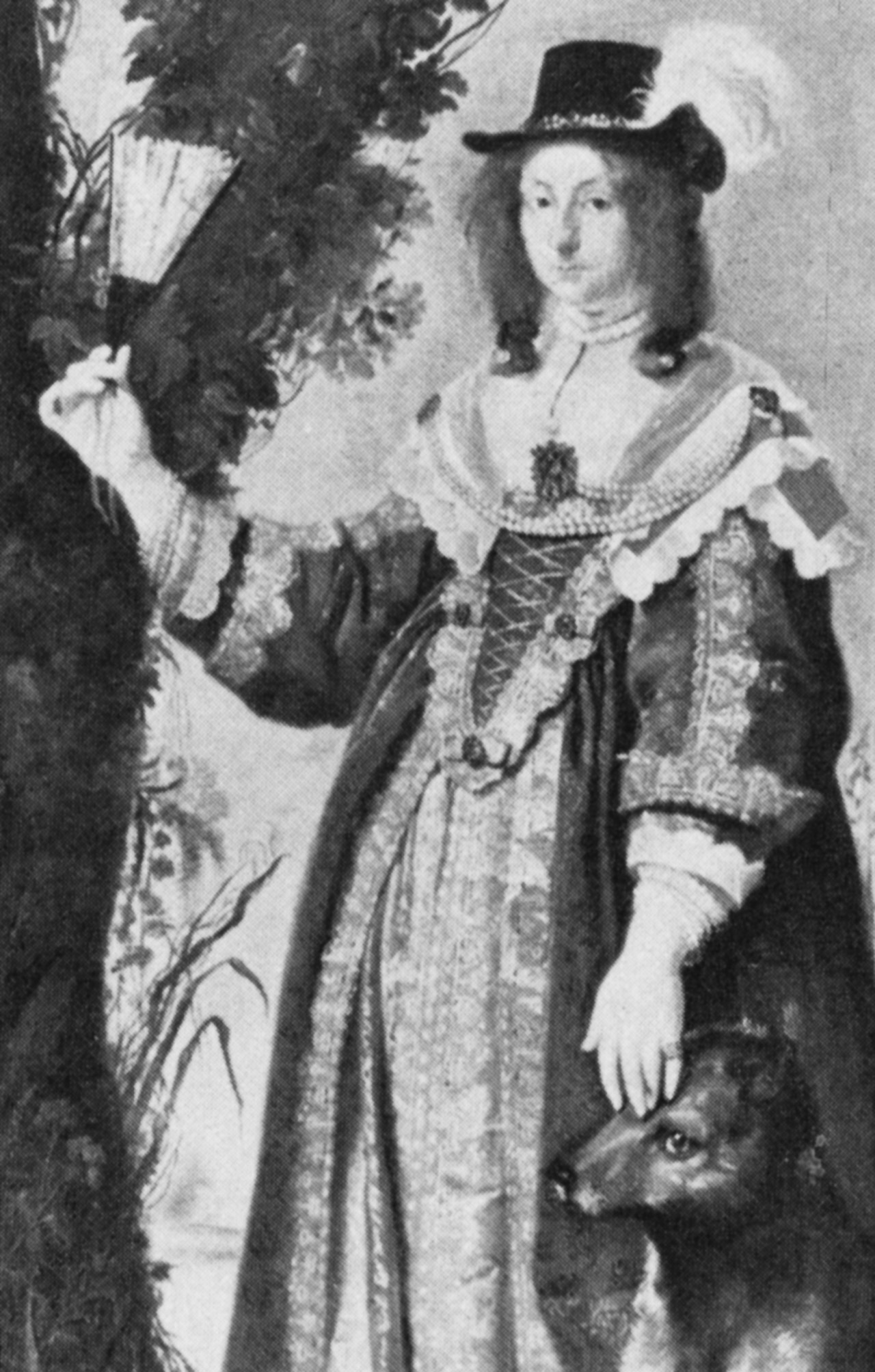 Leonora Christina Ulfeldt (* 8. Juli 1621 auf Schloss Frederiksborg bei Kopenhagen; † 16. März 1698 im Kloster Maribo, Dänemark) war eine dänische Schriftstellerin und Adlige.